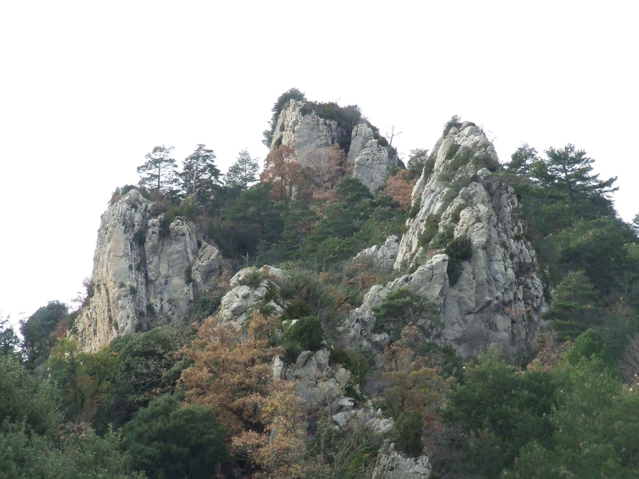 Ca l'Arte (Abella de la Conca, Pallars Jussà)